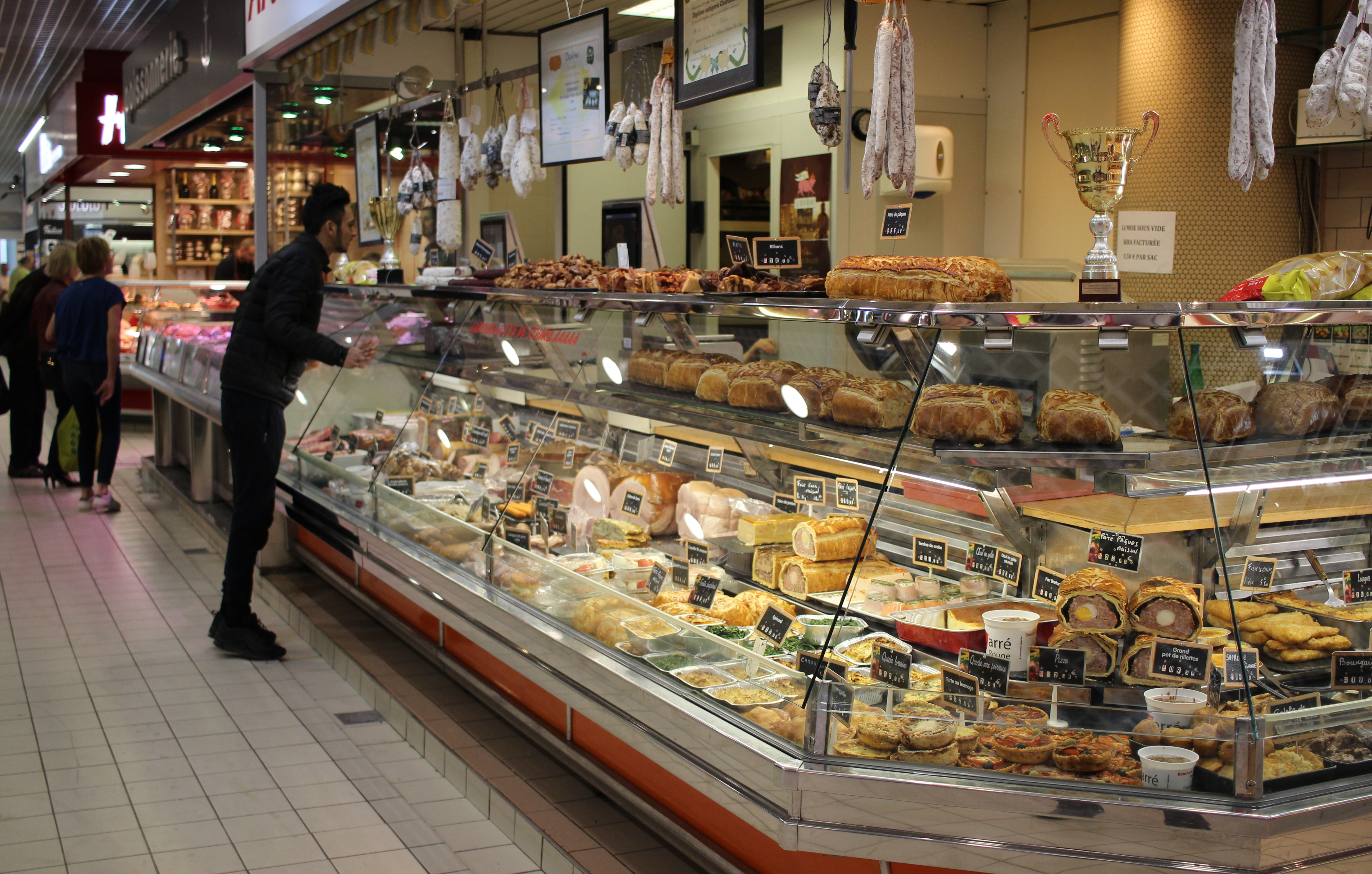 Tours - Halles de Tours - Avril 2019 - étal de charcuterie